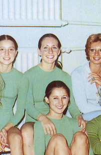 María José Rodríguez con la selección nacional de gimnasia rítmica en 1975.